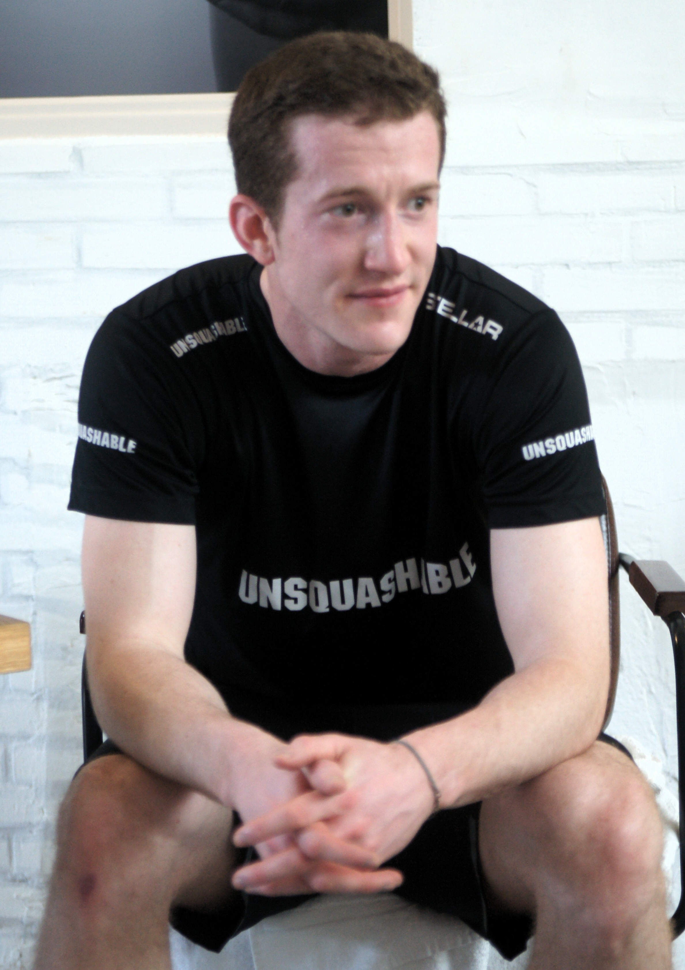 Todd Harrity, 2019